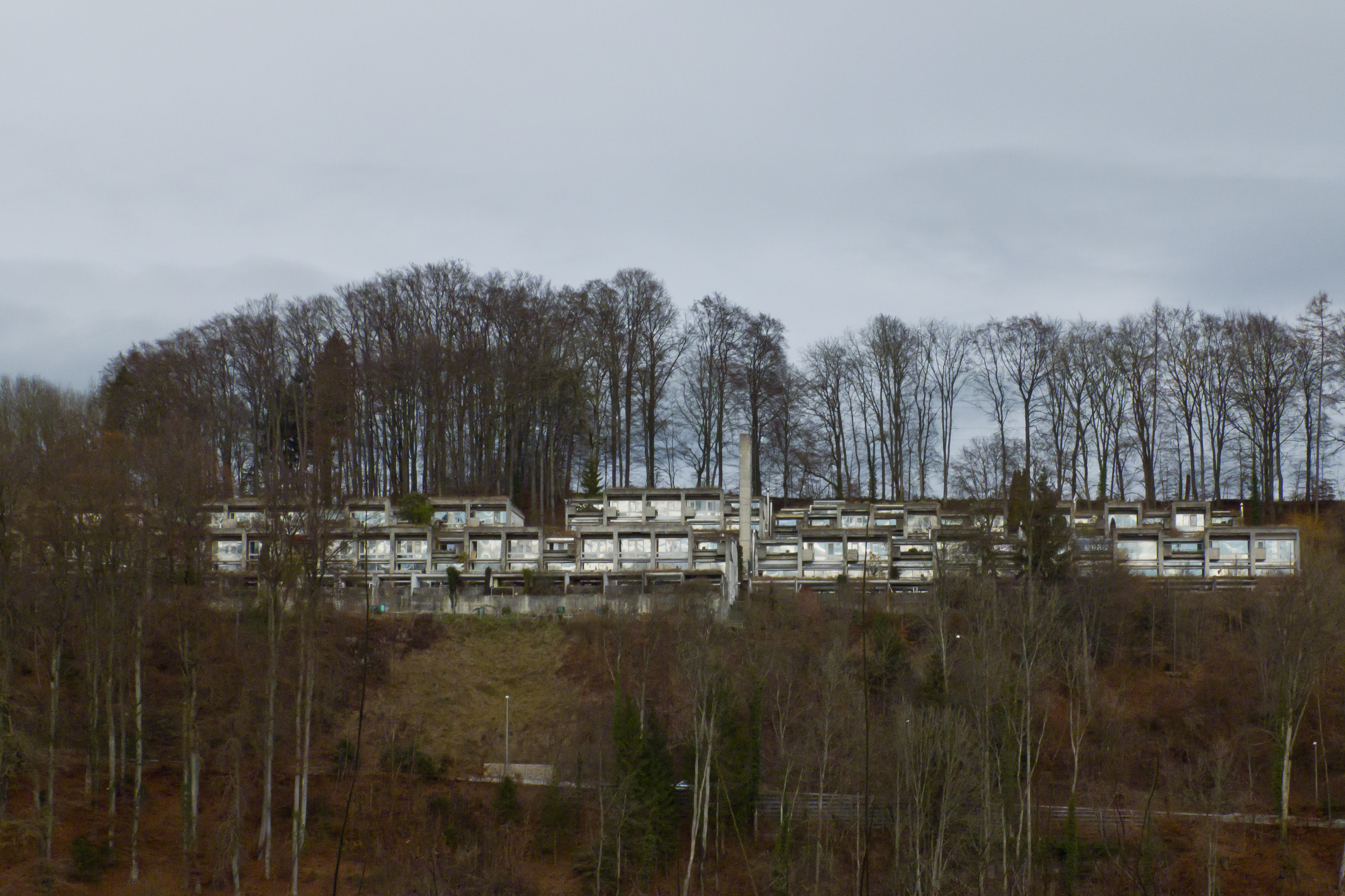 Siedlung Halen, Blick vom Bremgartenwald